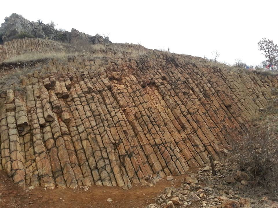 Kızılcahamam Bazaltları, Çamlıdere Jeoparkı